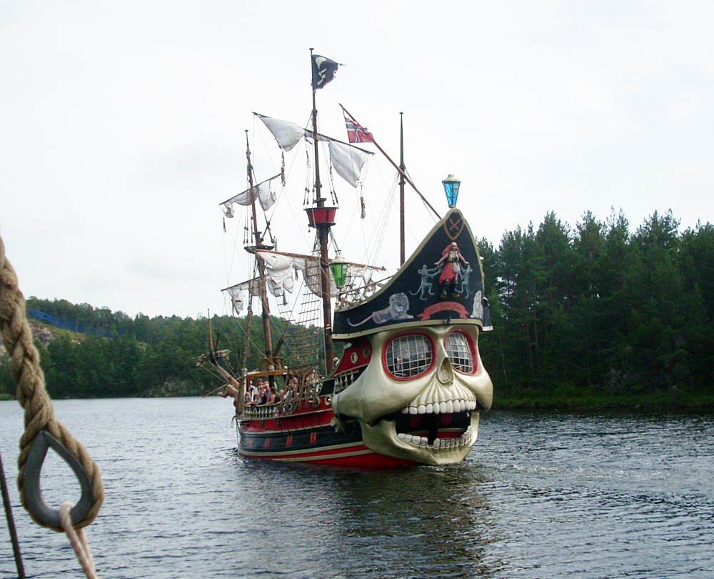 Den sorte dame i Dyreparken i Kr.Sand